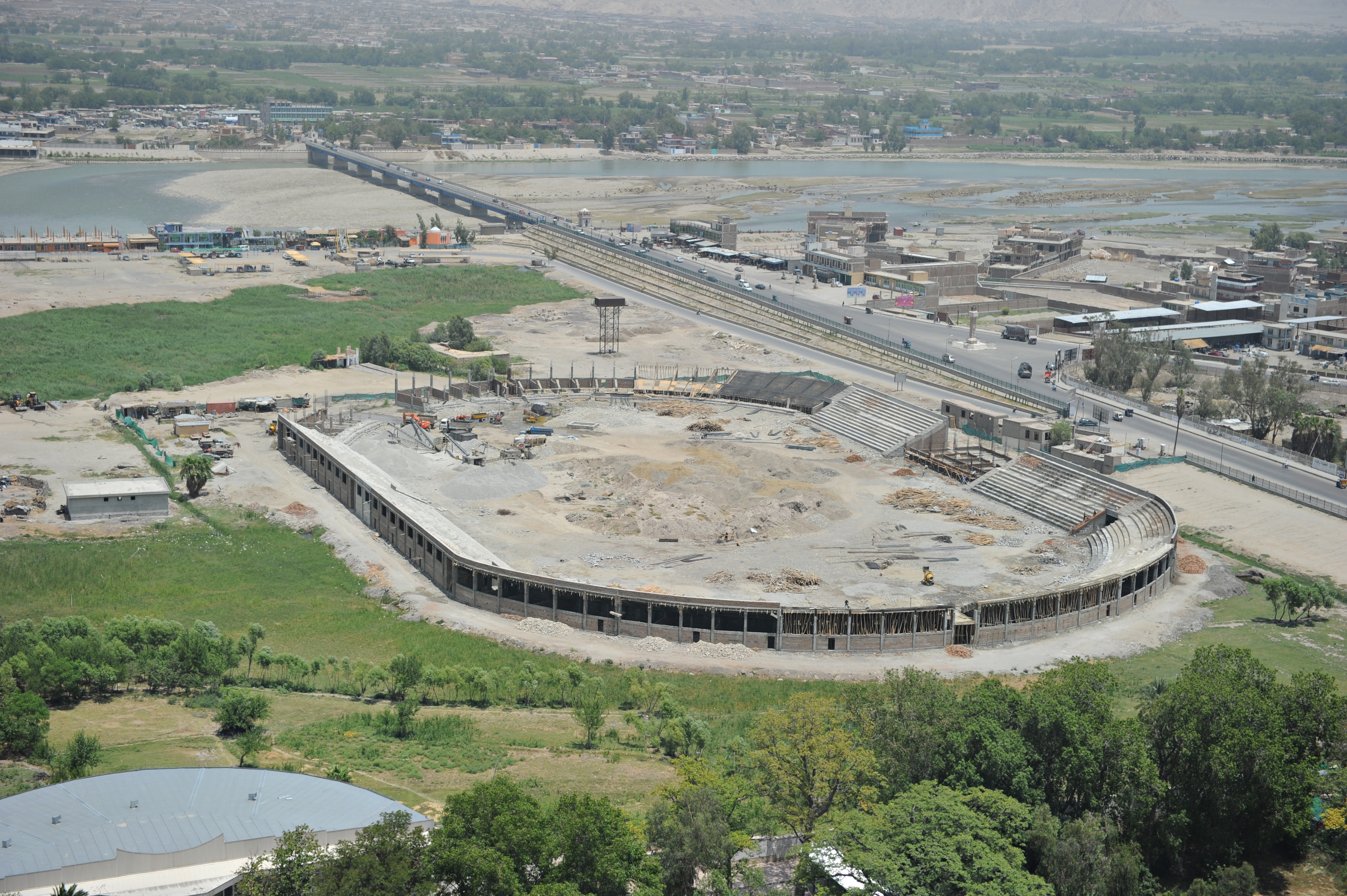 Jalalabad, Nangarhar Province, Afghanistan on Thursday, June 23, 2011.